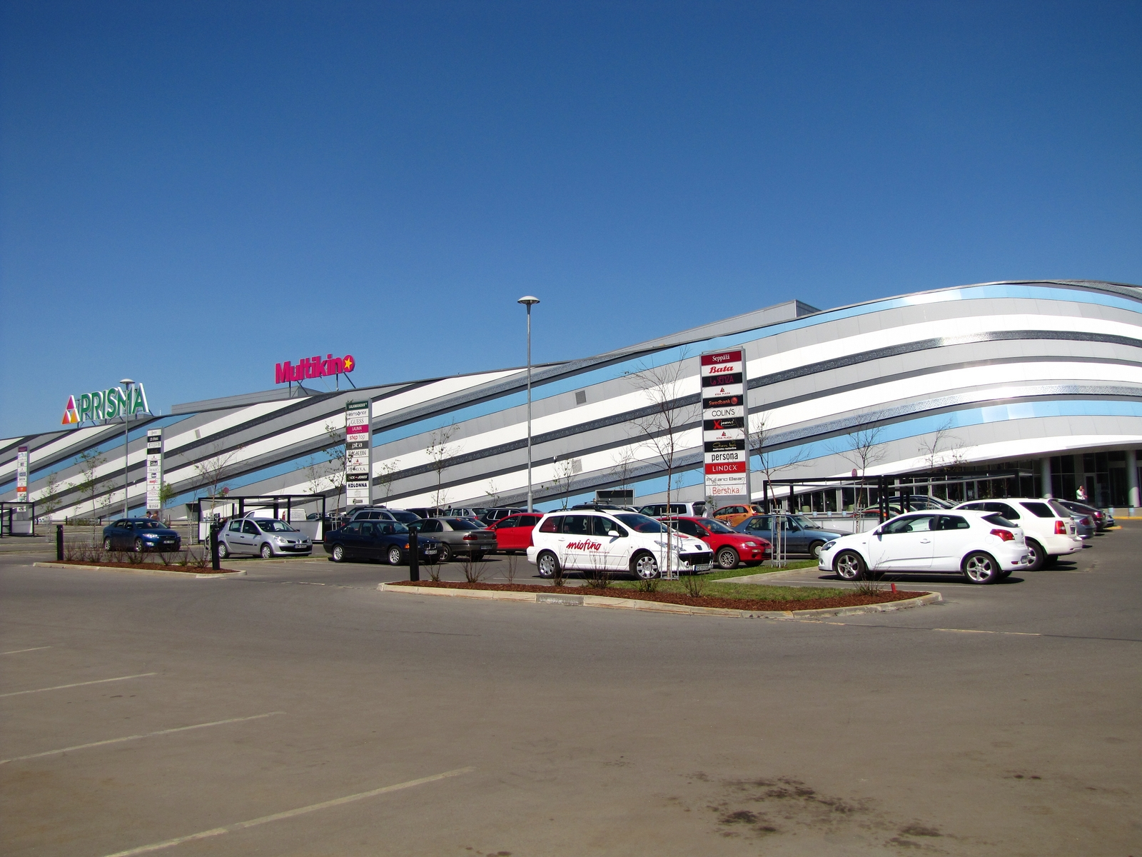 Riga Plaza